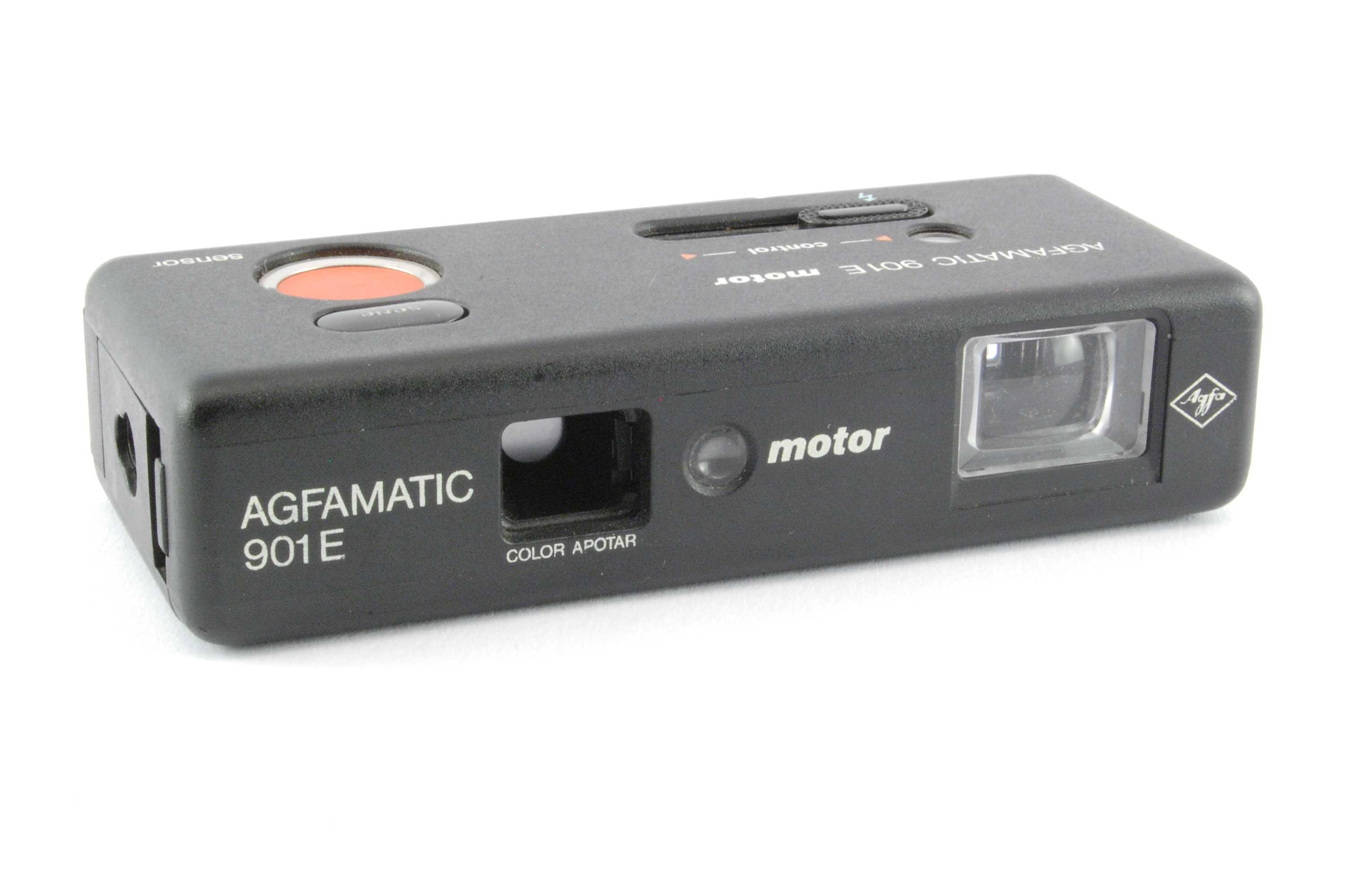 AGFA Agfamatic 901E von 1978